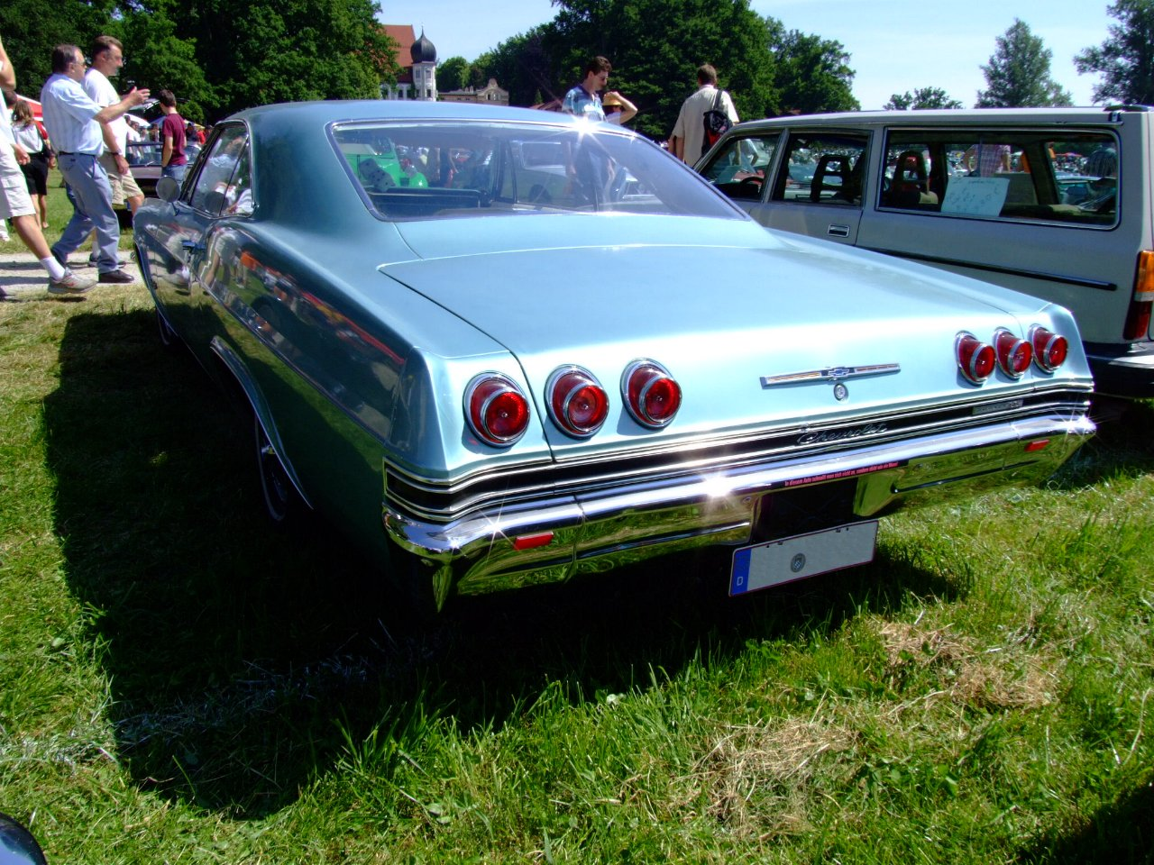 Chevrolet Impala SS Baujahr: 1965 250 PS